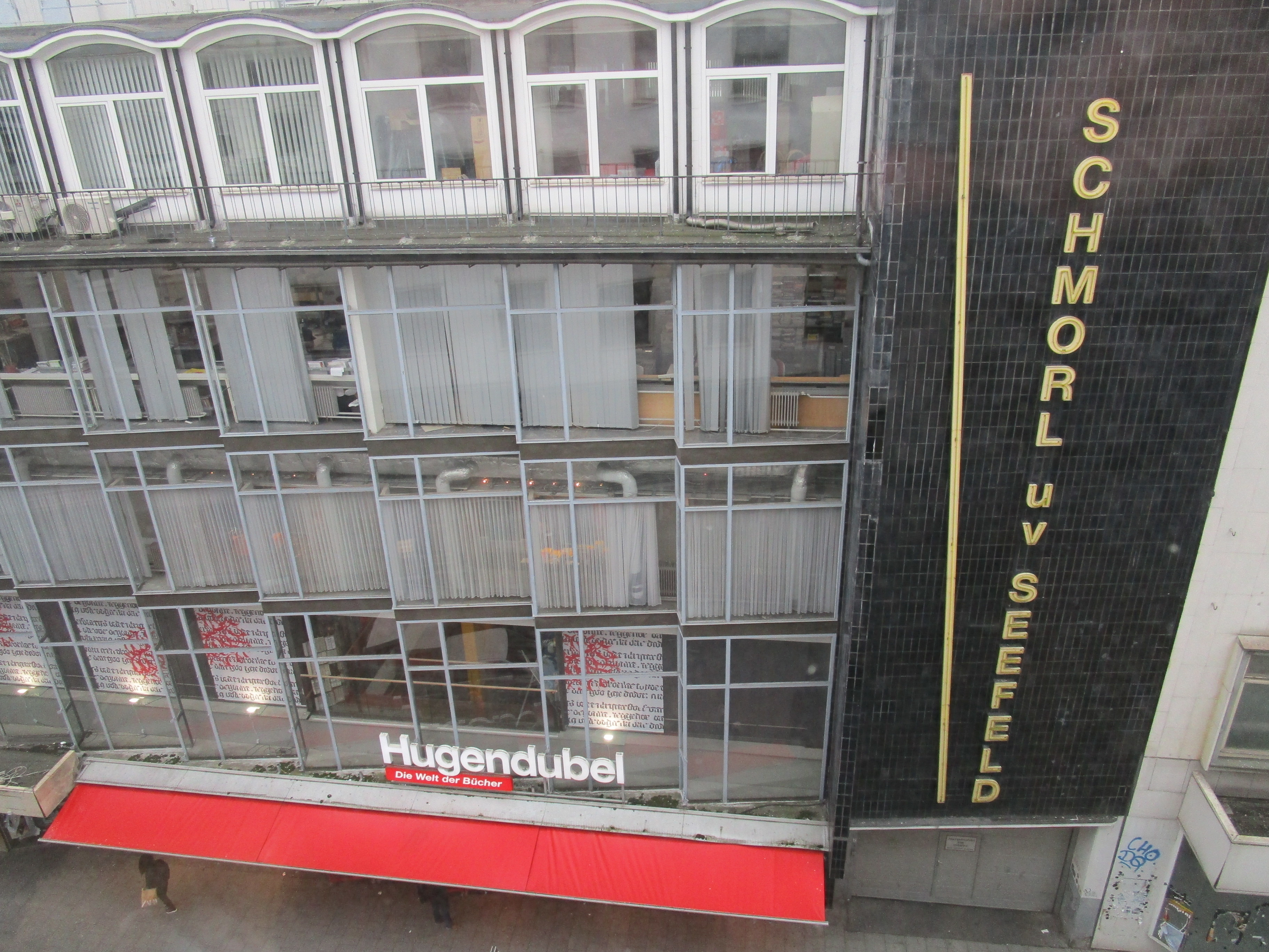 Die traditionsreiche Buch- und Medienhandlung Schmorl & von Seefeld betrieb das Hauptgeschäft in der Bahnhofstraße 14 in Hannover. Das Gebäude wurde bis 1953 von dem Architekten Adolf Falke errichtet. Hier ein Blick auf die Fassade in der Großen Packhofstraße aus dem vierten Stock, vom 1. März 2019 an genutzt vom Wikipedia-Büro Hannover, des Hauses Andreaestraße 1.